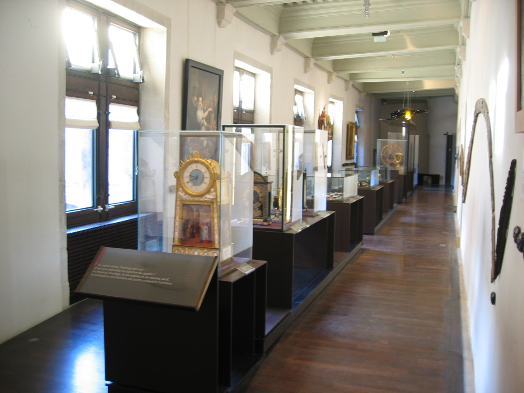 Musée du Temps de Besançon - Franche Comté - France